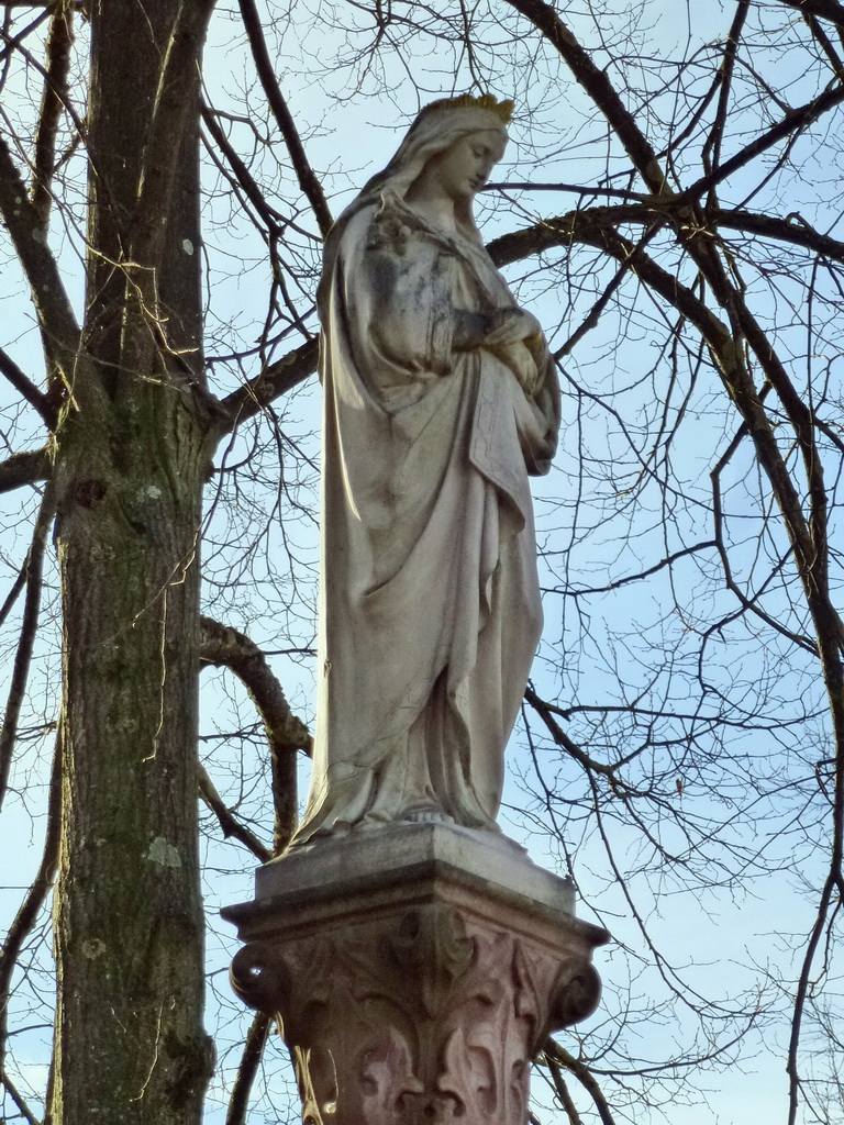 Detail Marienfigur mit Mantel; Mantelsaum mit Ornament verziert.